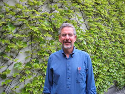 Foto di Kenneth Brown